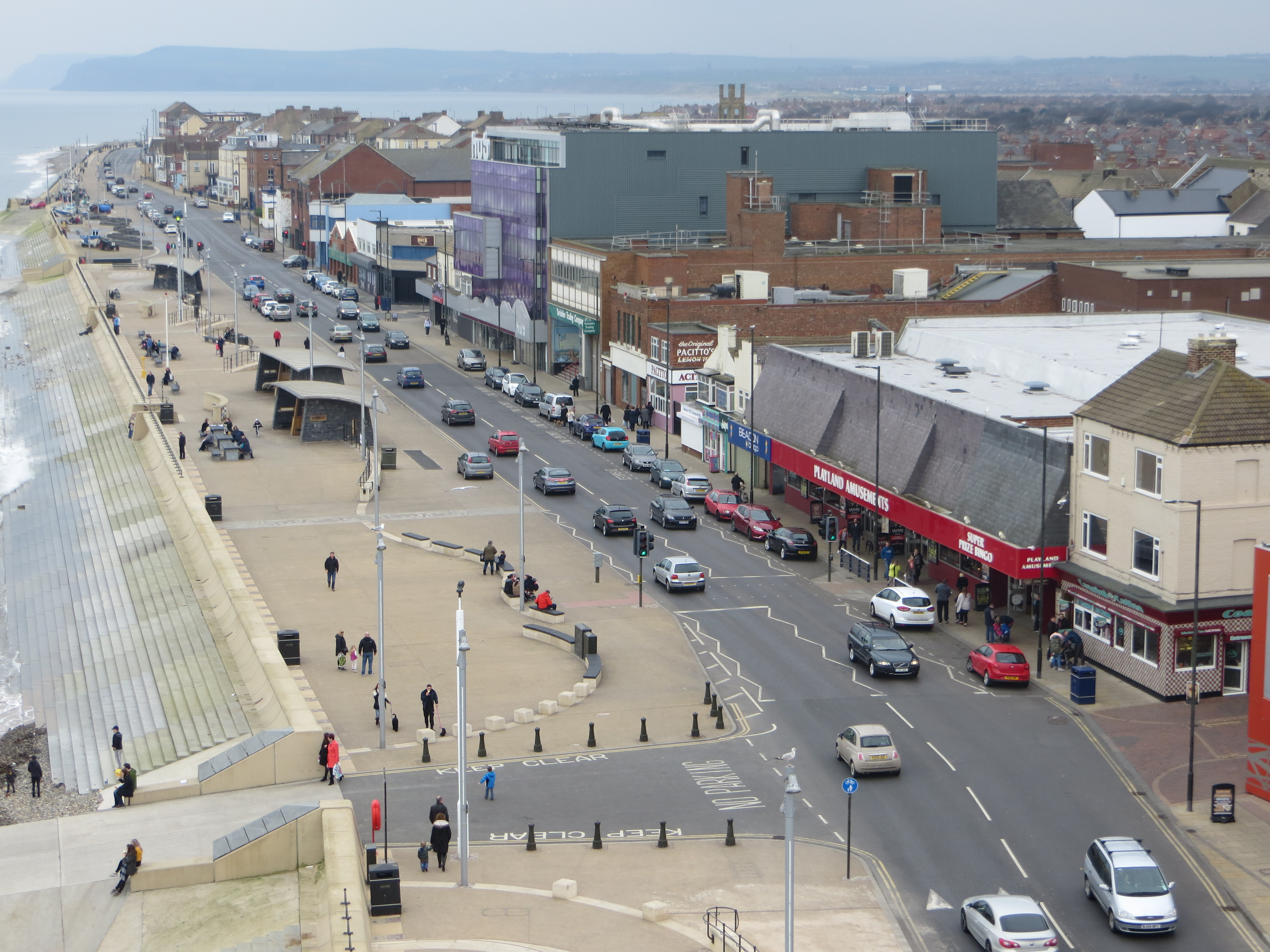 Redcar